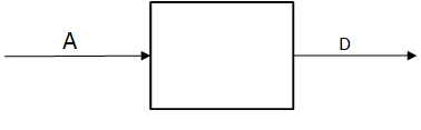 Поступающий и выходящий потоки данных из сервера